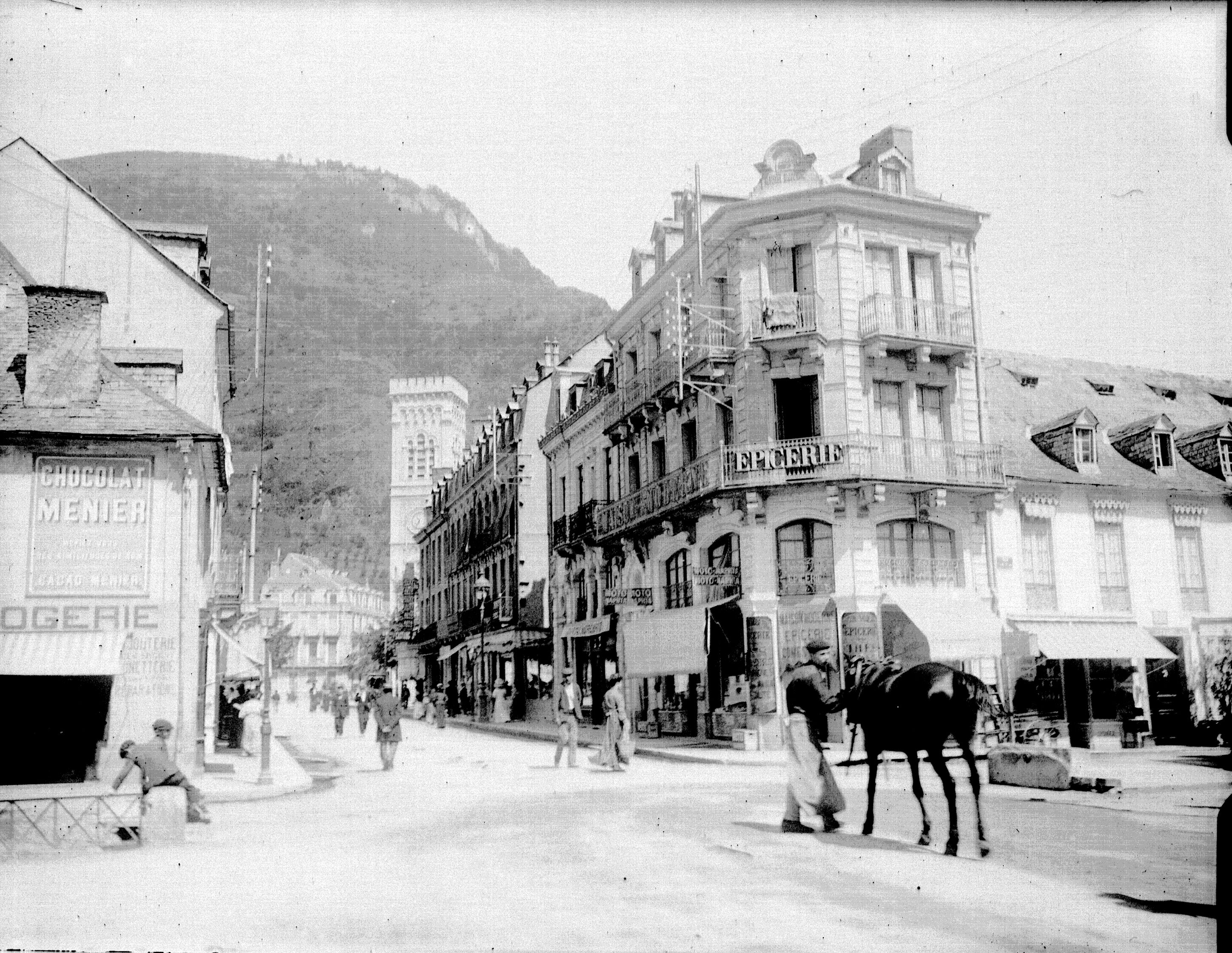 Fonds Trutat - Photographie ancienne Lieu de création : Bagnères-de-Luchon (Haute-Garonne) Observations : Notes manuscrites Trutat : " Goerz Anschutz Jougla rose ". Mot(s)-clé(s) : -- Rue -- Echoppe -- Epicerie -- Horlogerie -- Réverbère -- Façade -- Eglise -- Homme -- Femme -- Enfant -- Cheval -- Bagnères-de-Luchon (Haute-Garonne) -- Rue Carnot (Bagnères-de-Luchon) -- Pique (France ; vallée) -- Pyrénées (France) -- 20e siècle, 1e quart